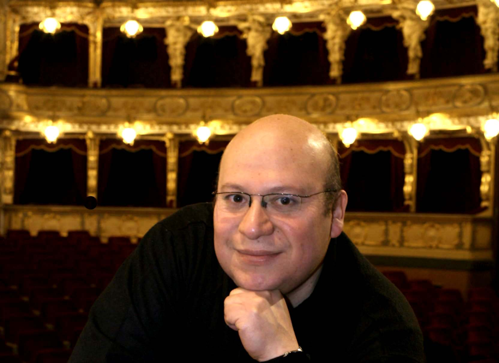 NOE COLIN _ 2010